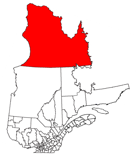 Carte de l'administration régionale Kativik (Nunavik)